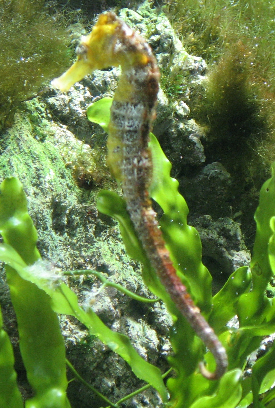 Hippocampus reidi in Aquarium Cinéaqua Map: 48° 51' 44" N 2° 17' 27" E